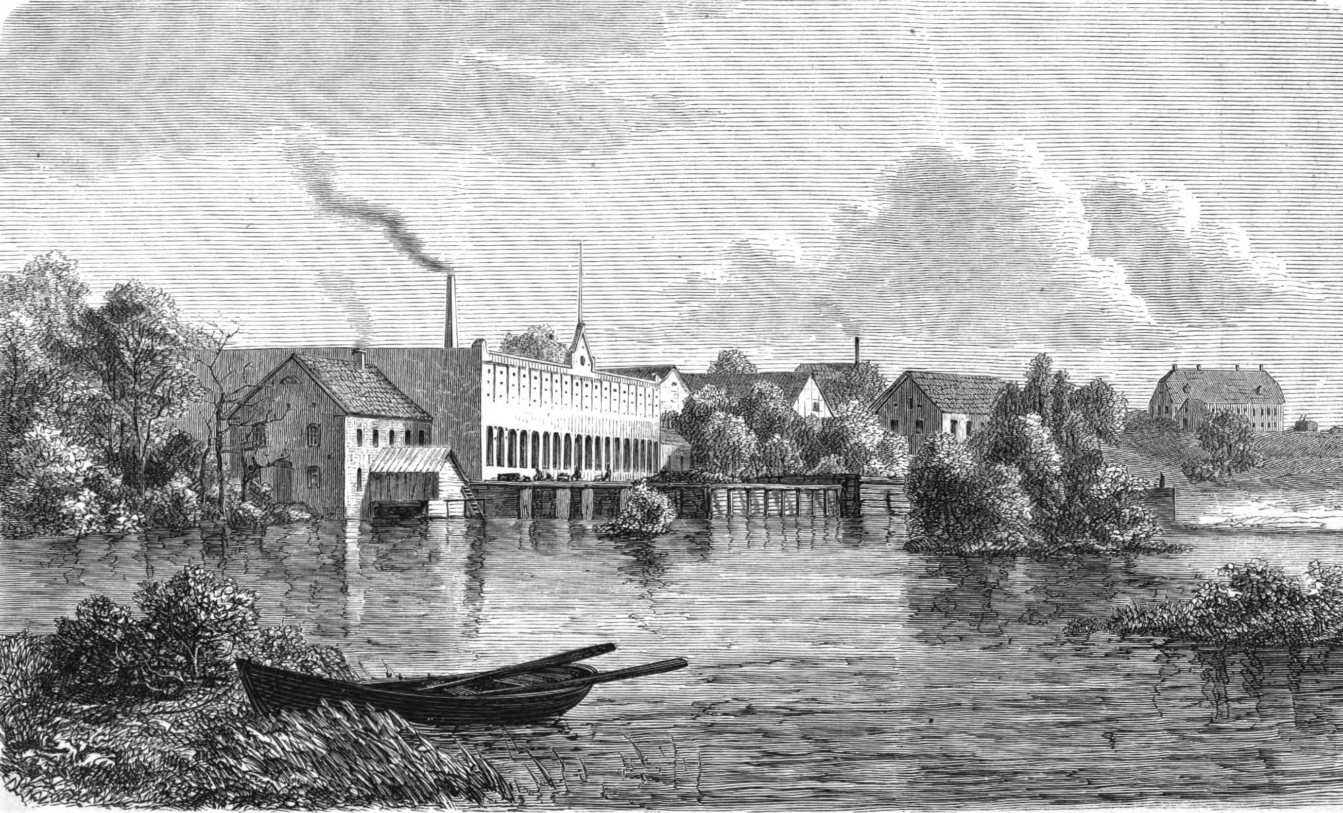 Textilfabriken Slottsmöllan vid Halmstad.